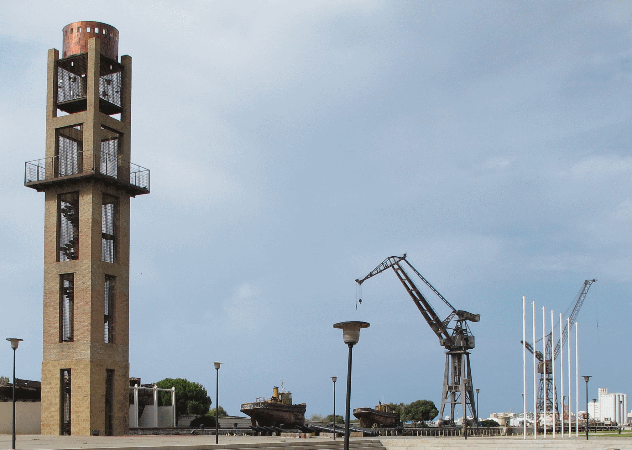 Vista del área histórica del Astillero de Navantia en Puerto Real, donde podemos observar barcos e infraestructura naval histórica.